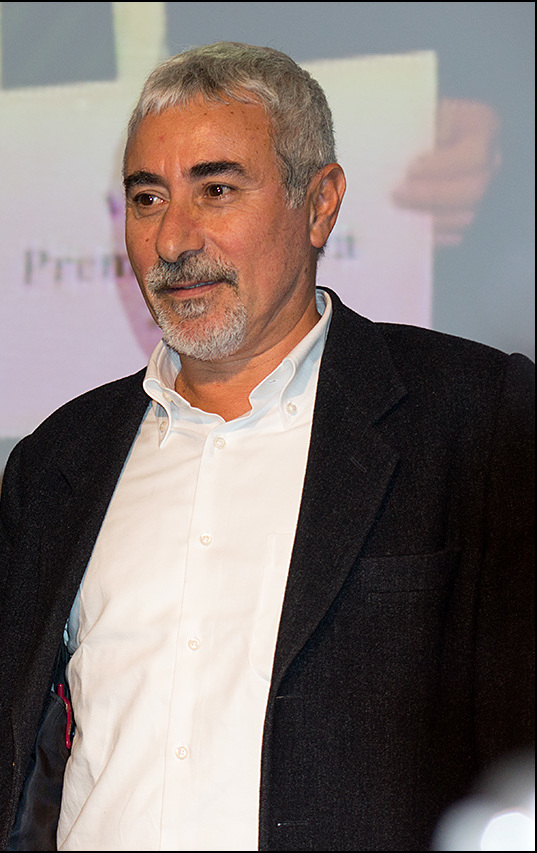 Premiazione